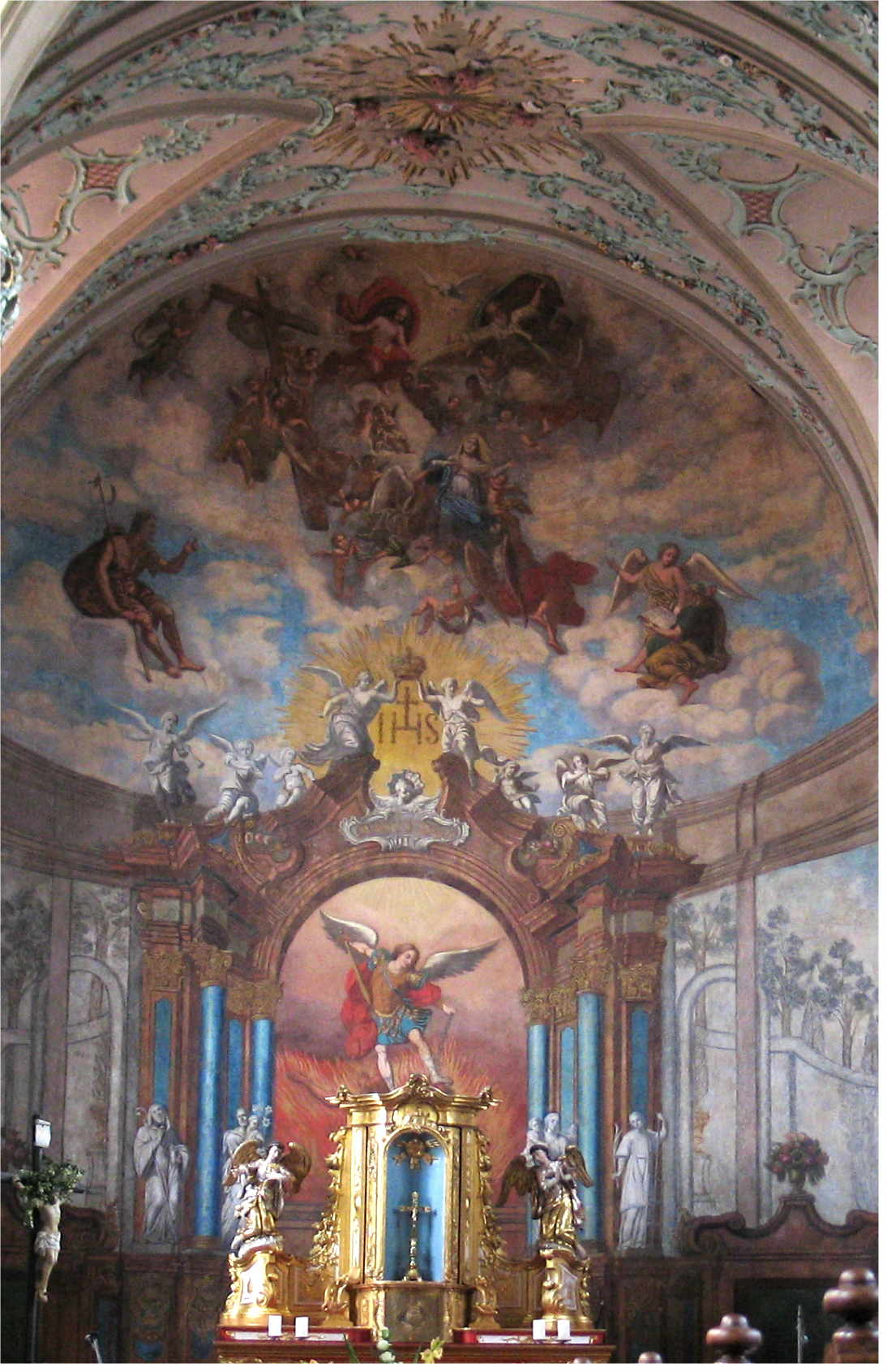 Chouer an der Kierch zu Munneref. Kategorien: Munneref + Kategorie:Gemeng Munneref